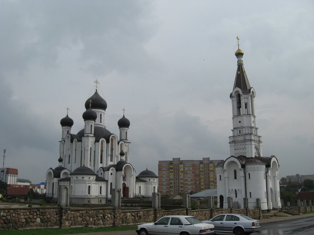 Івацэвічы. Царква